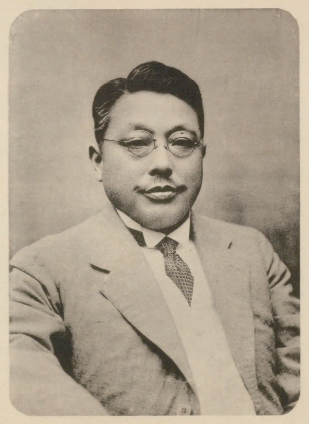 Portrait of Shimooka Chuji (下岡忠治, 1870 – 1925)